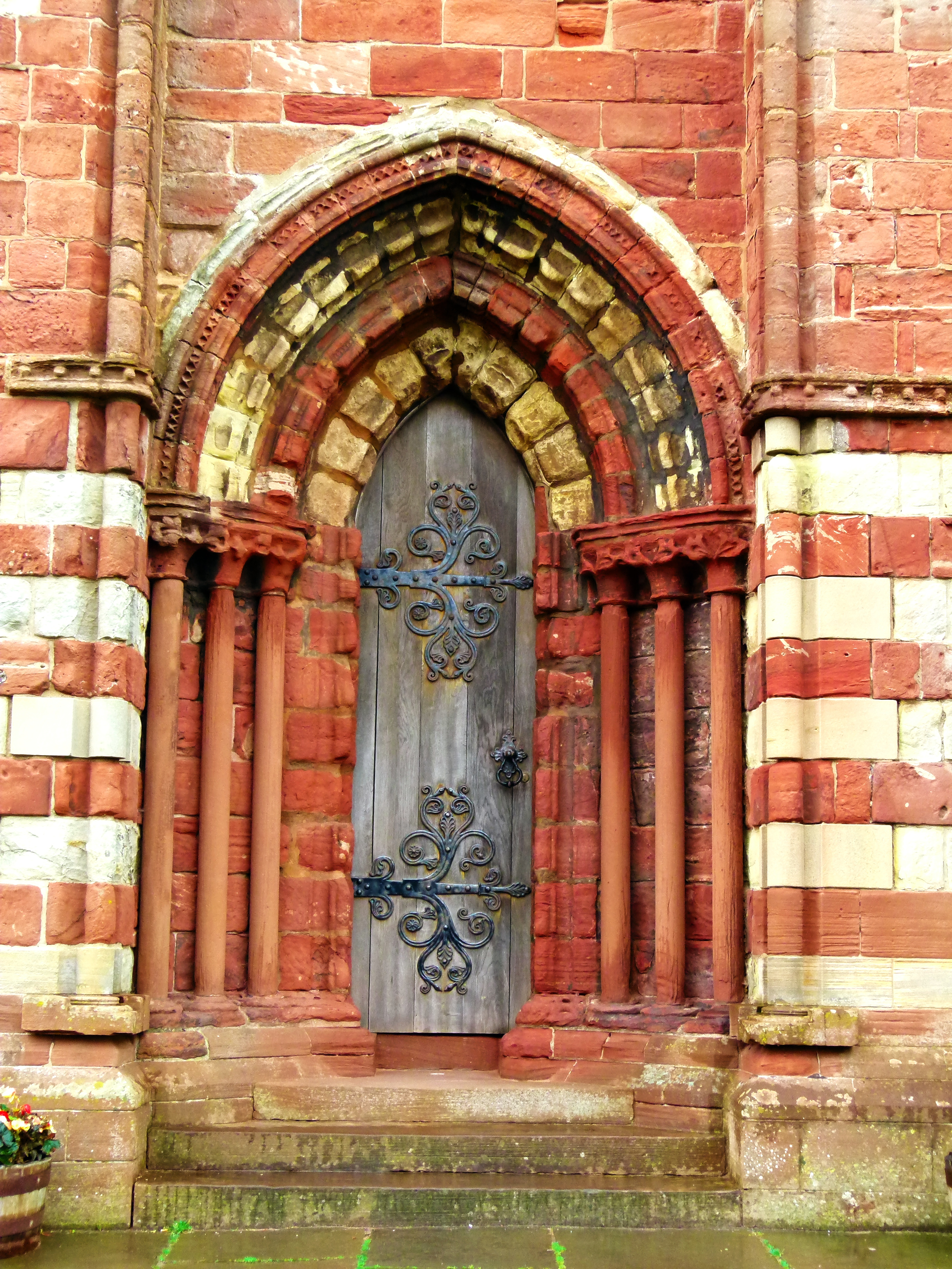 Door